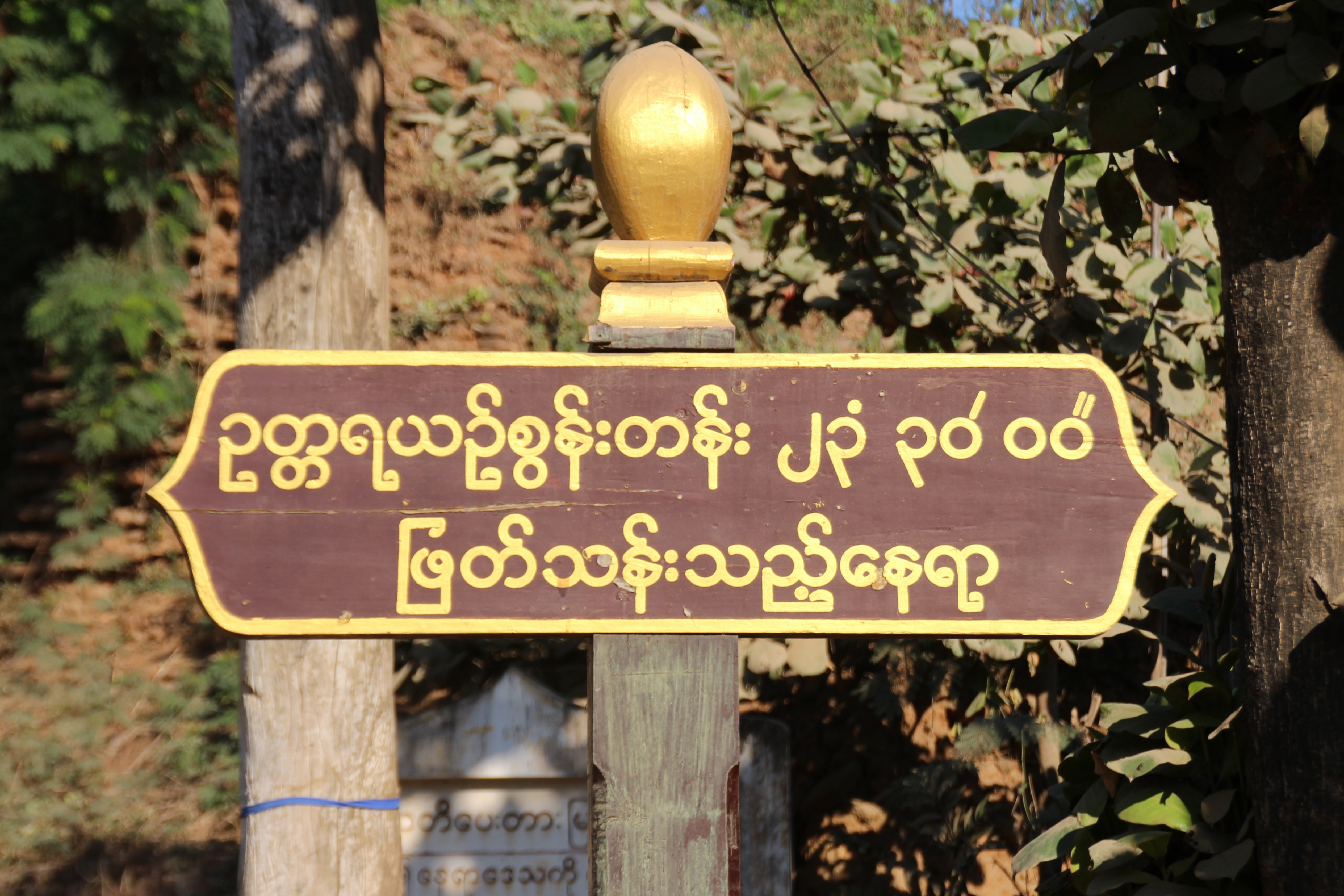 မြန်မာဘာသာ: တကောင်းမြို့ ရှိ ဥတ္တရယဉ်စွန်းတန်းဖြတ်သန်းရာနေရာတွင် စိုက်ထူထားသော ဆိုင်းဘုတ်အားတွေ့ရစဉ်